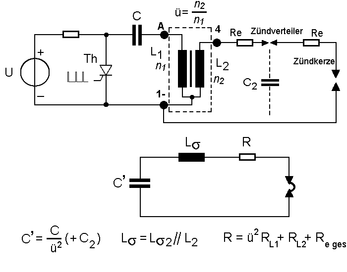 Capacitive Discharge Ignition: Equivalent Circuit Diagram